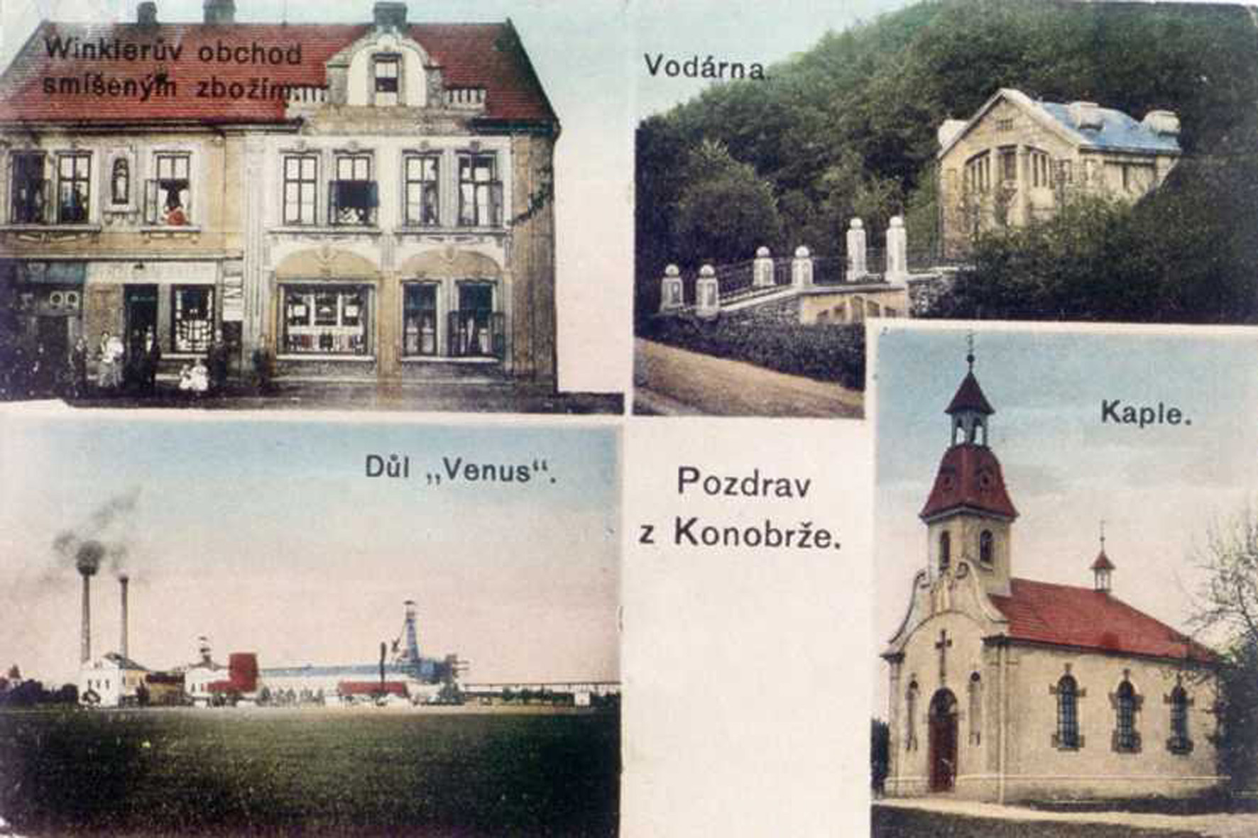 Ehemaliges Dorf Konobrže (Kummerpursch) bei Most (Brüx) in Tchechien.